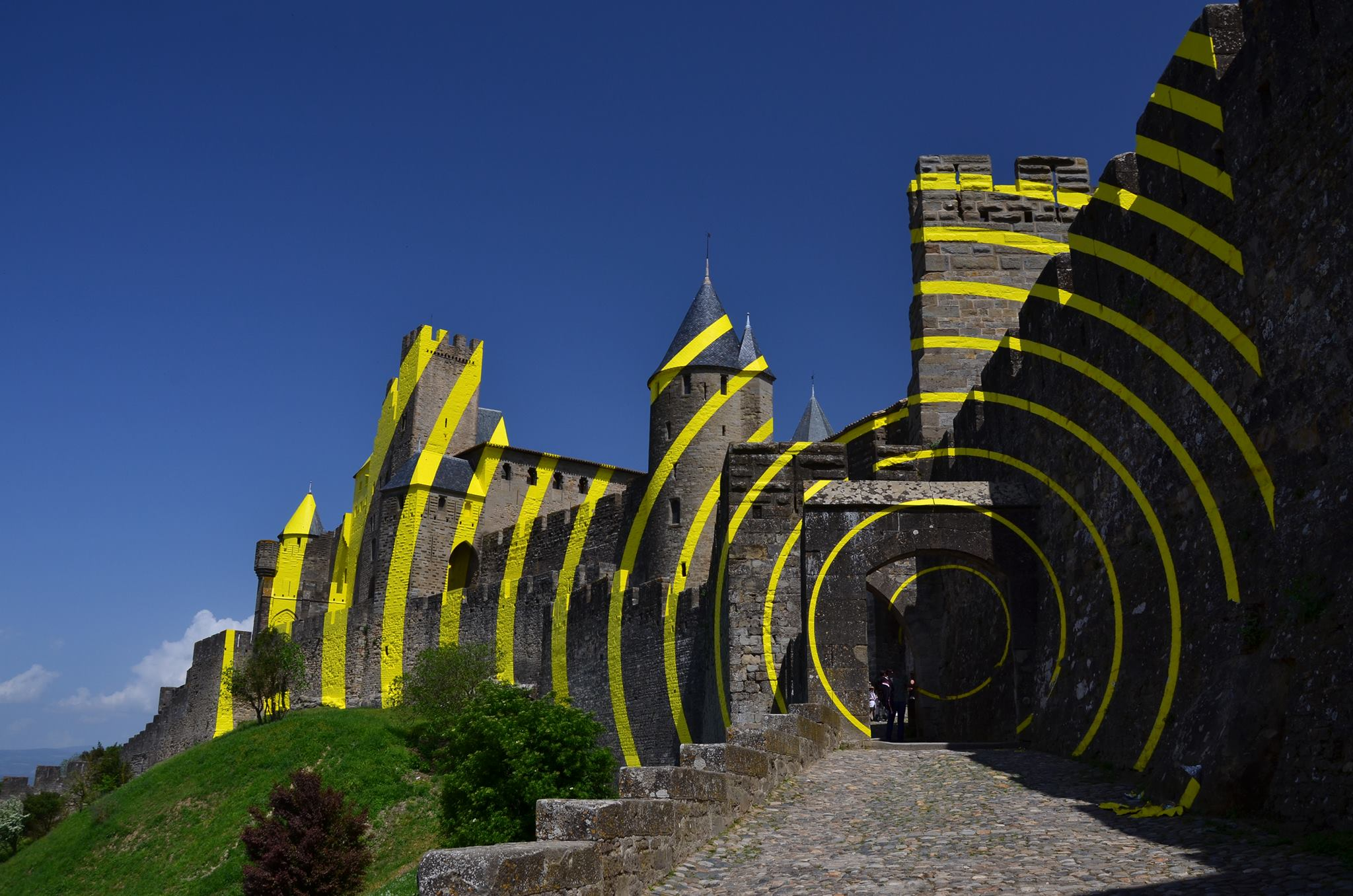 L'oeuvre « concentrique, excentrique » à la Cité de Carcassonne en avril 2018